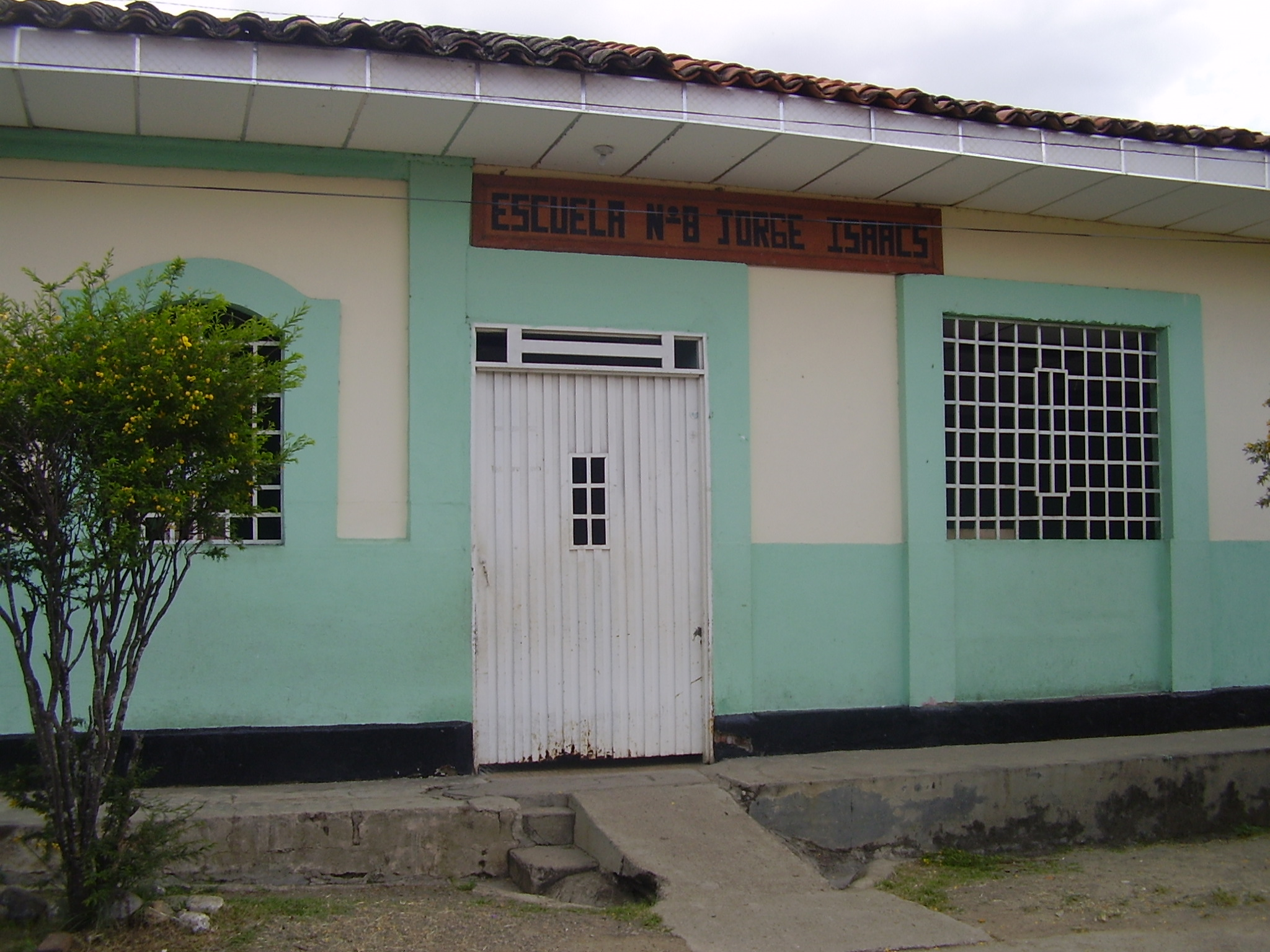 entrada fachada IE Santa Elena, sede Jorge Isaacs, a una cuadra del parque principal